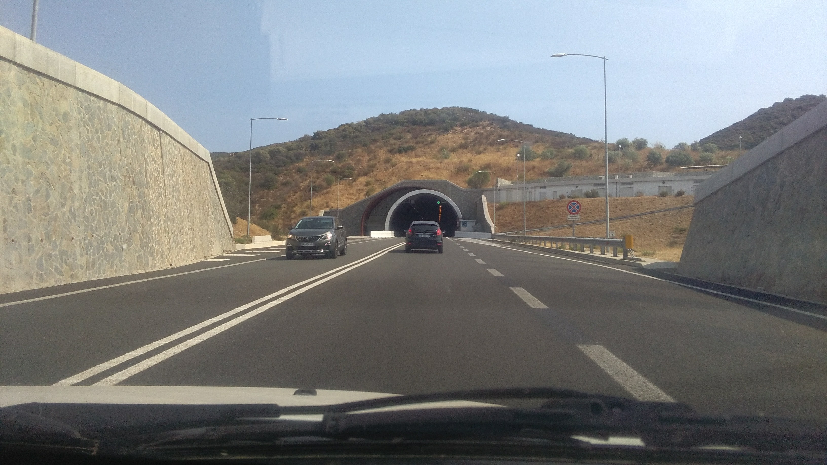 La prima galleria, in prossimità al km. 0